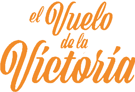 Logo for the telenovela El vuelo de la victoria.